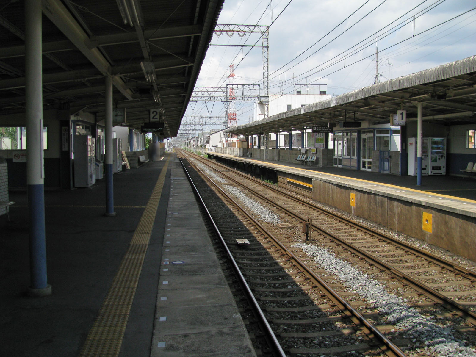 近鉄京都線富野荘駅